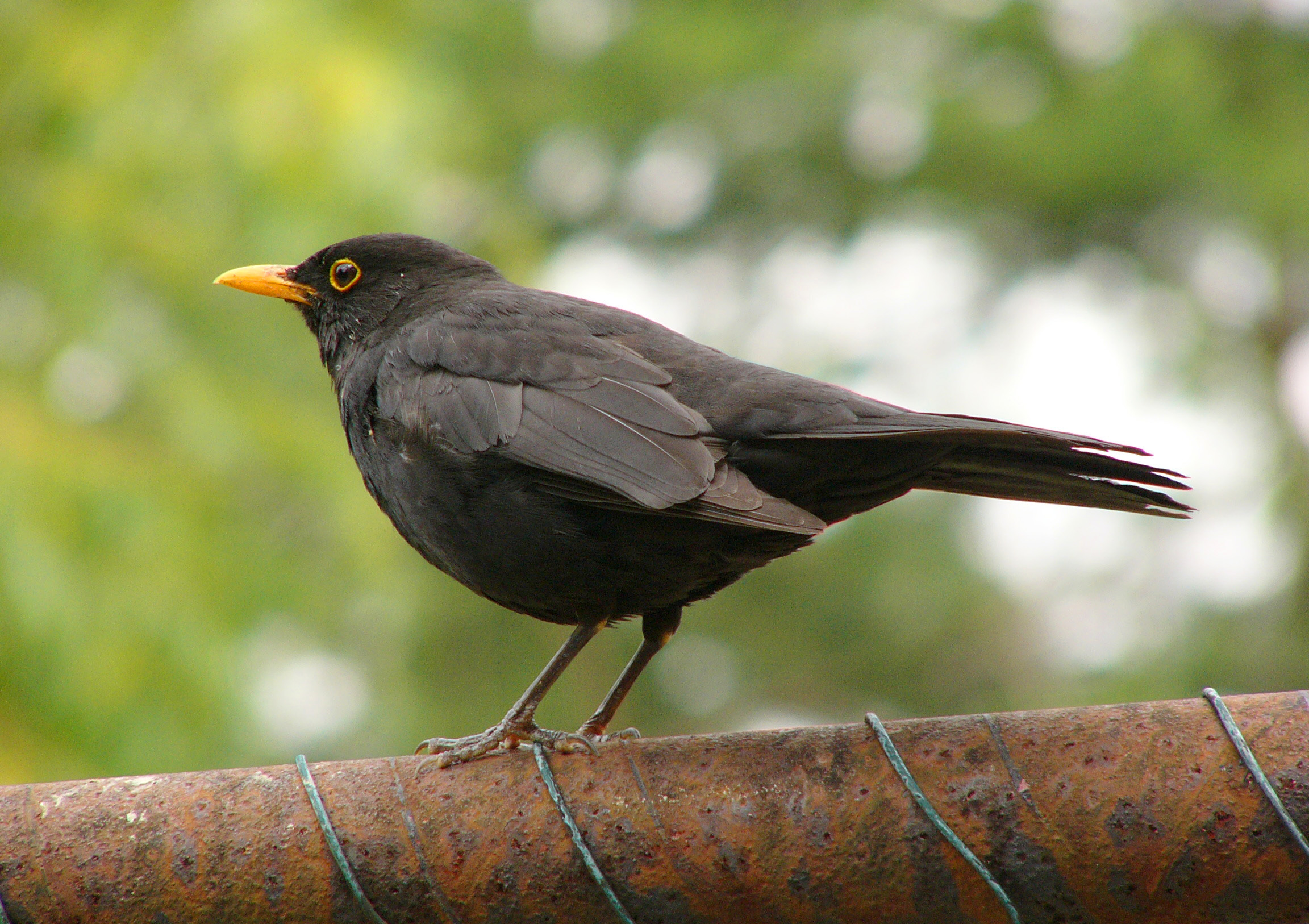 An adult blackbird male.